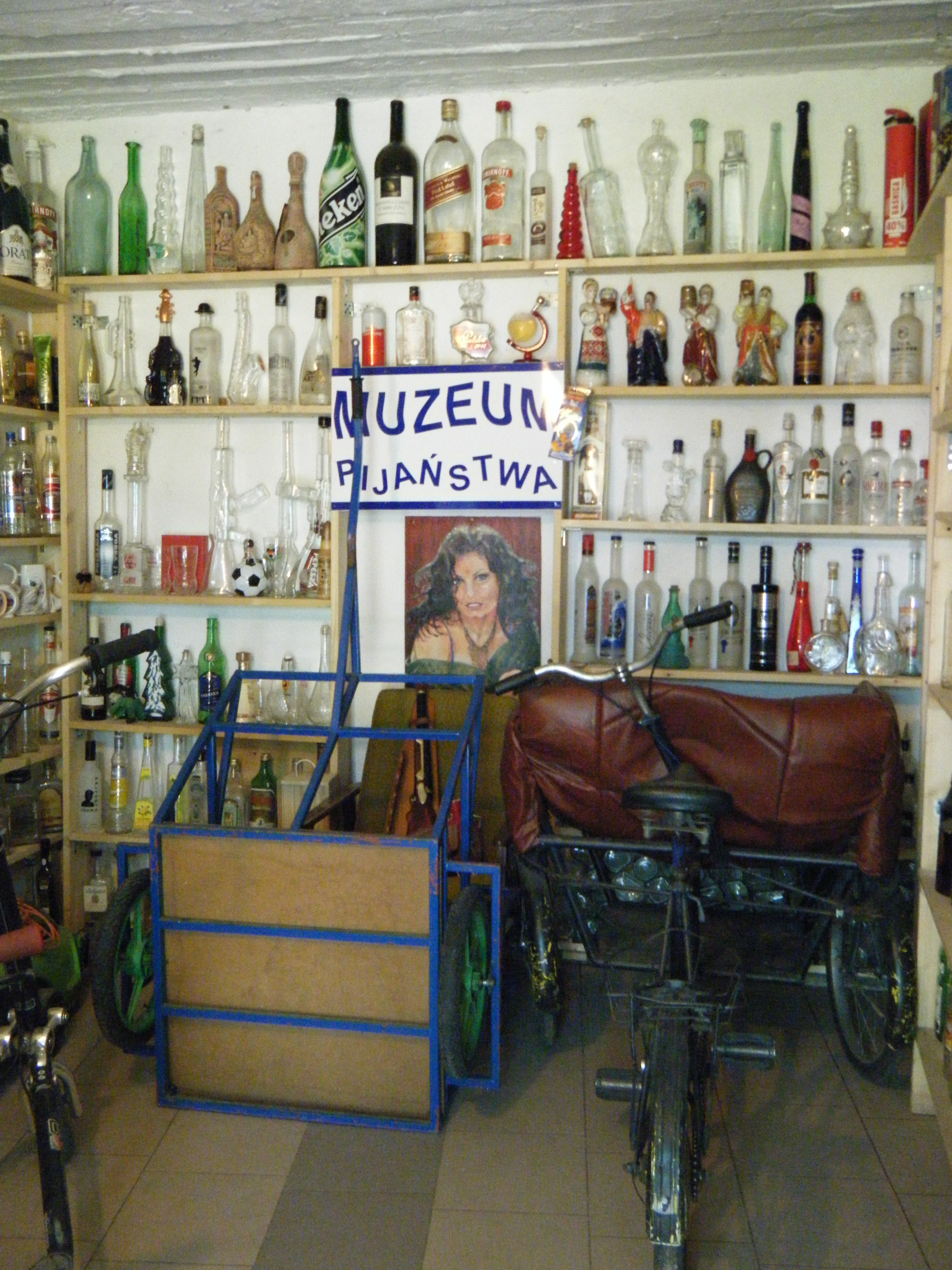 Muzeum Pijaństwa w Gołębiu.